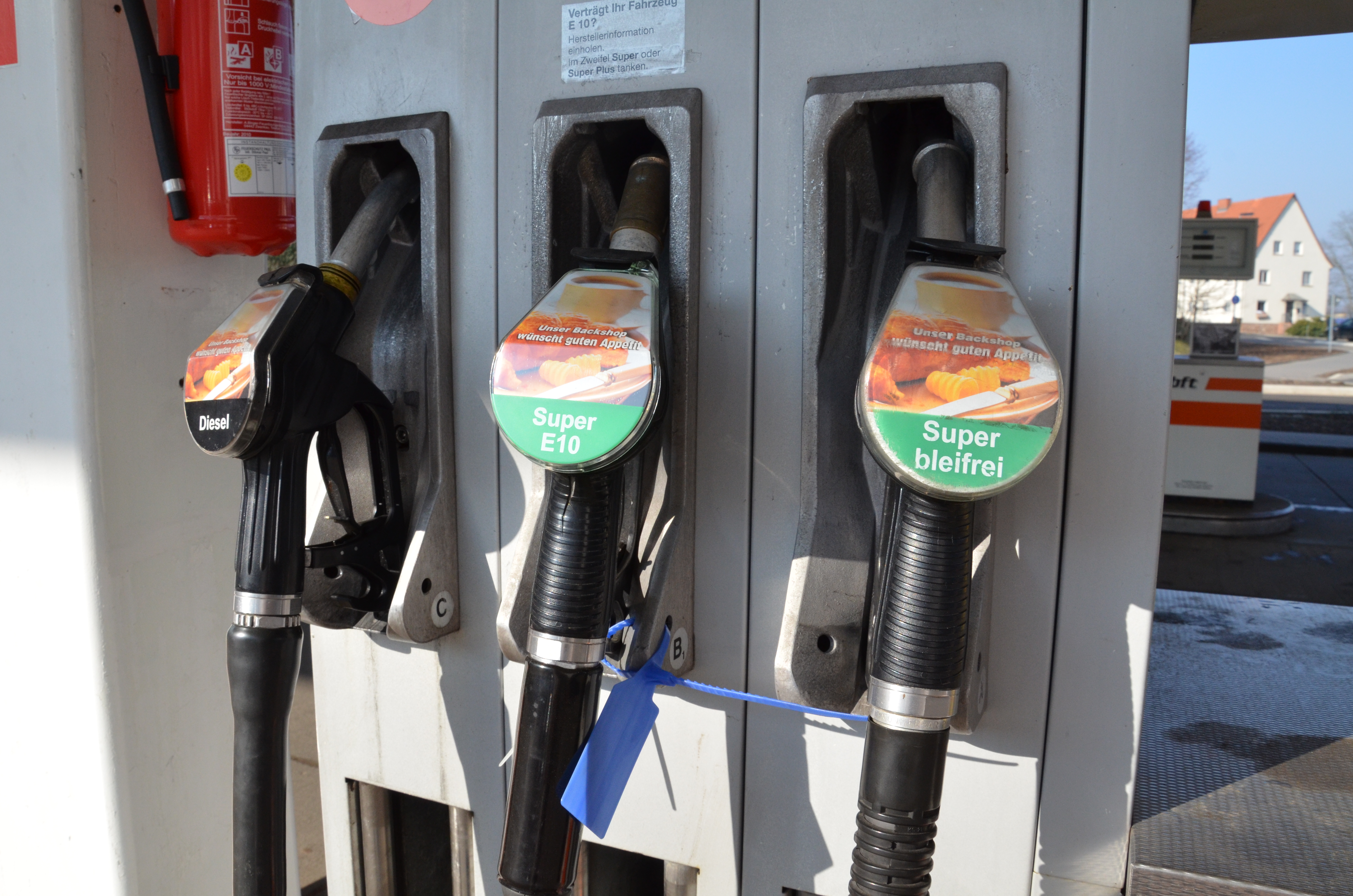 gesperrte Säule mit Super E10 Sprit am 4. März 2011 im Großraum Frankfurt.